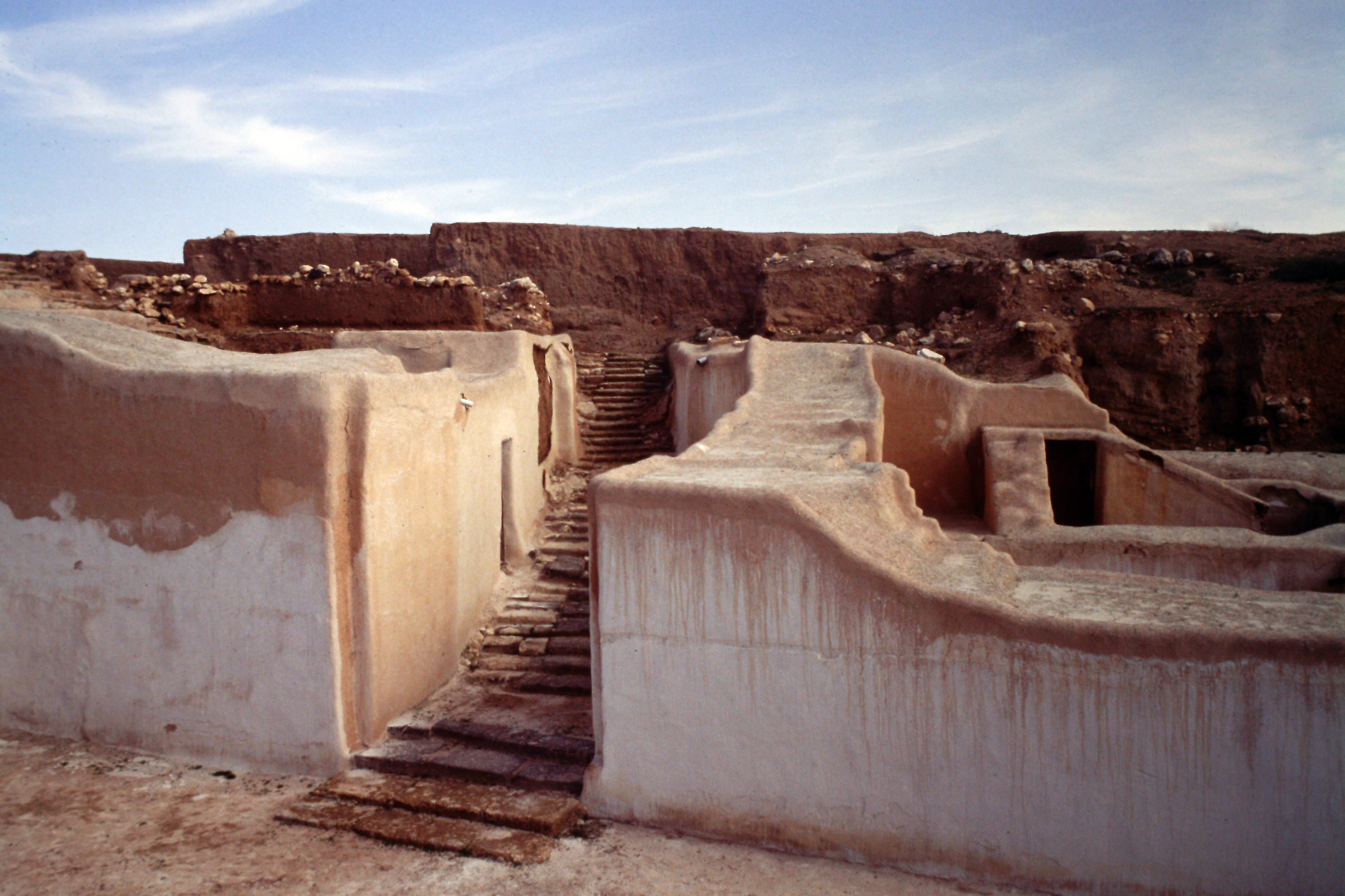 Ebla, 1993